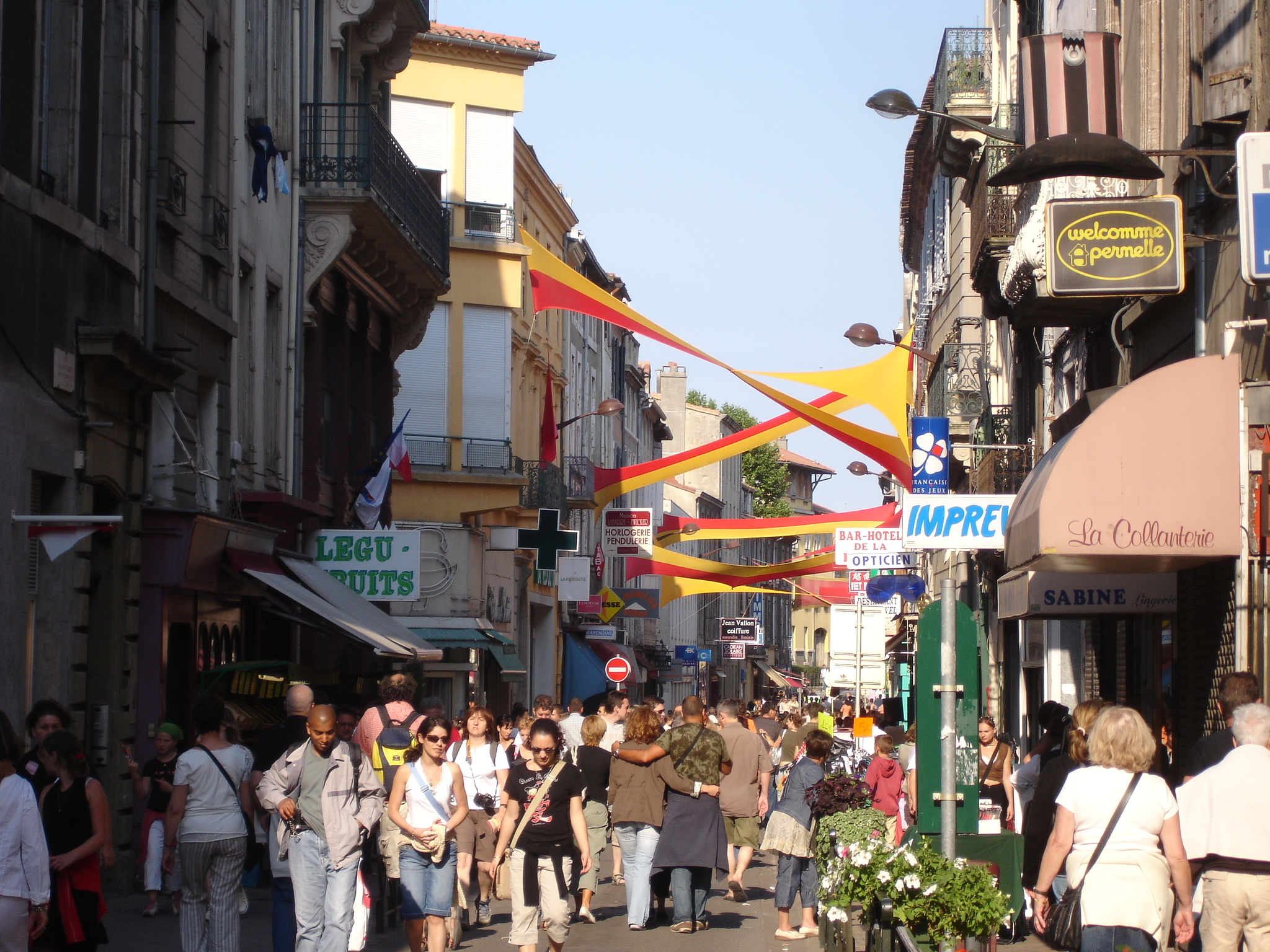 france, Aude (11), Carcassonne, rue de Verdun